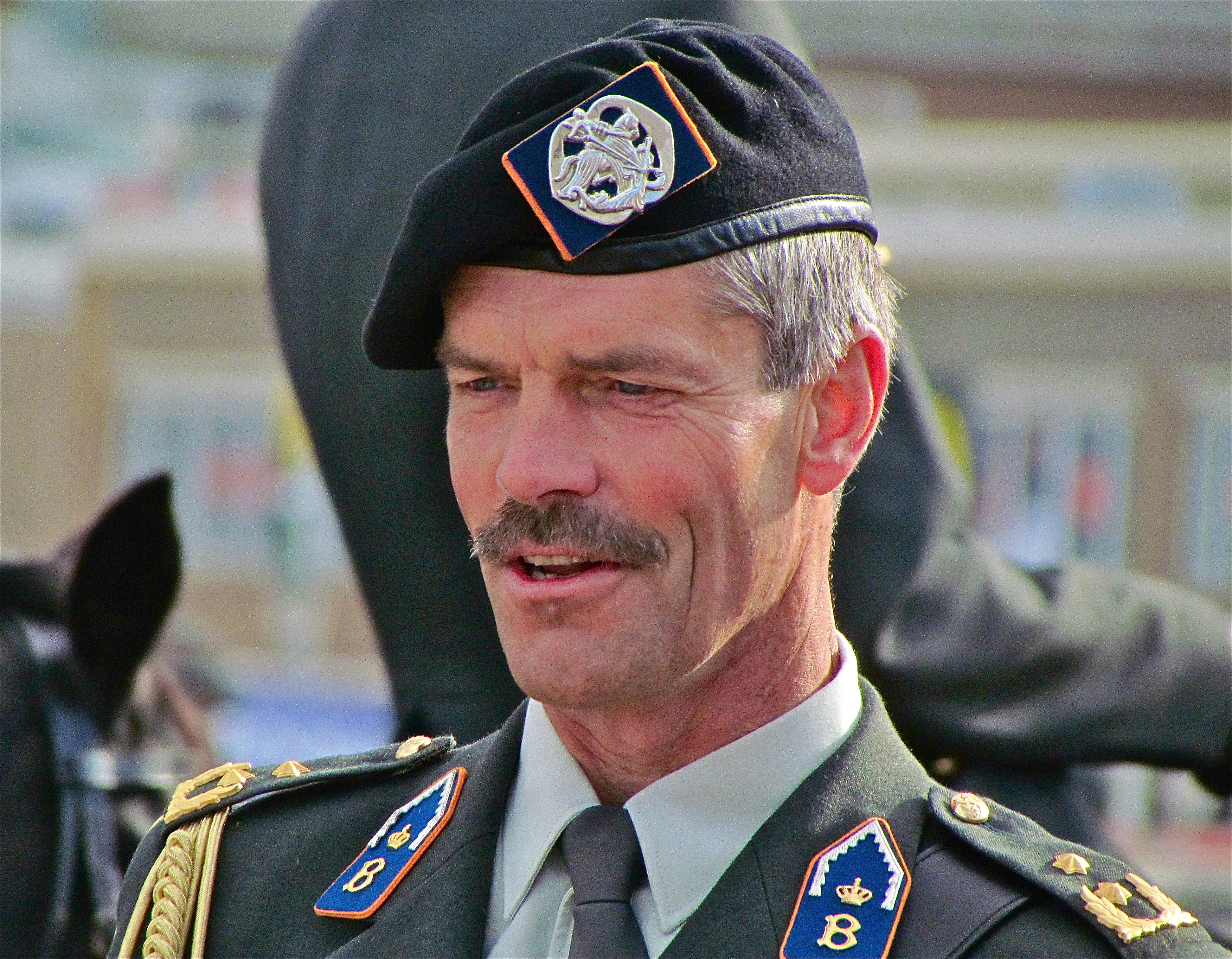 Henk Morsink. Foto gemaakt tijdens het oefenen voor prinsjesdag op het Scheveningse strand.